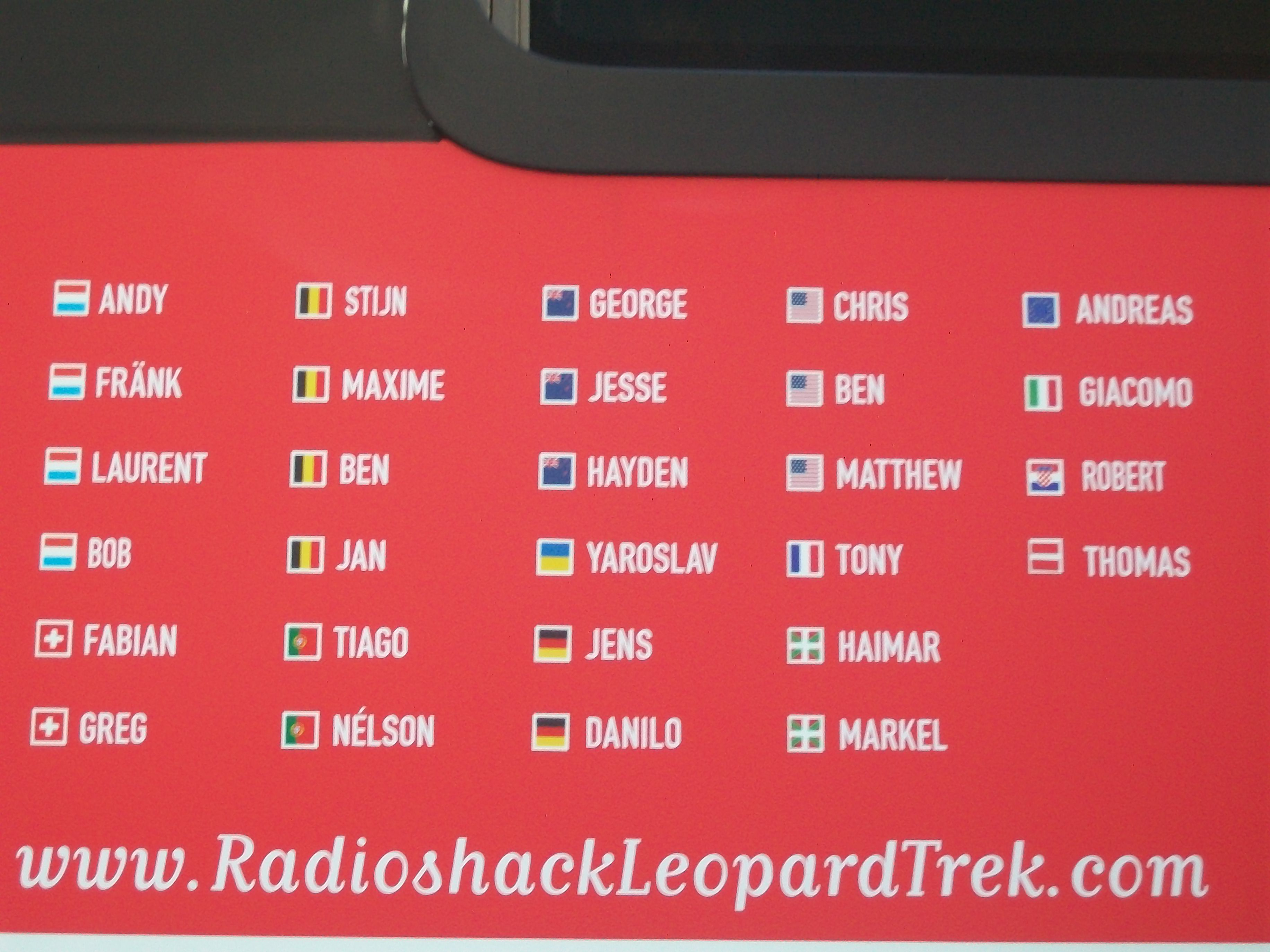 Detalle con los nombres de los corredores del equipo RadioShack en 2013.